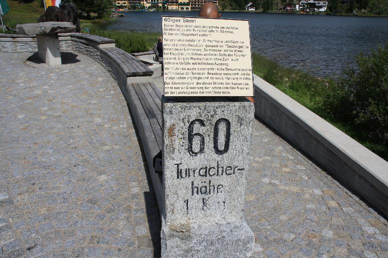 Der 60iger Stein auf der Turracher Höhe